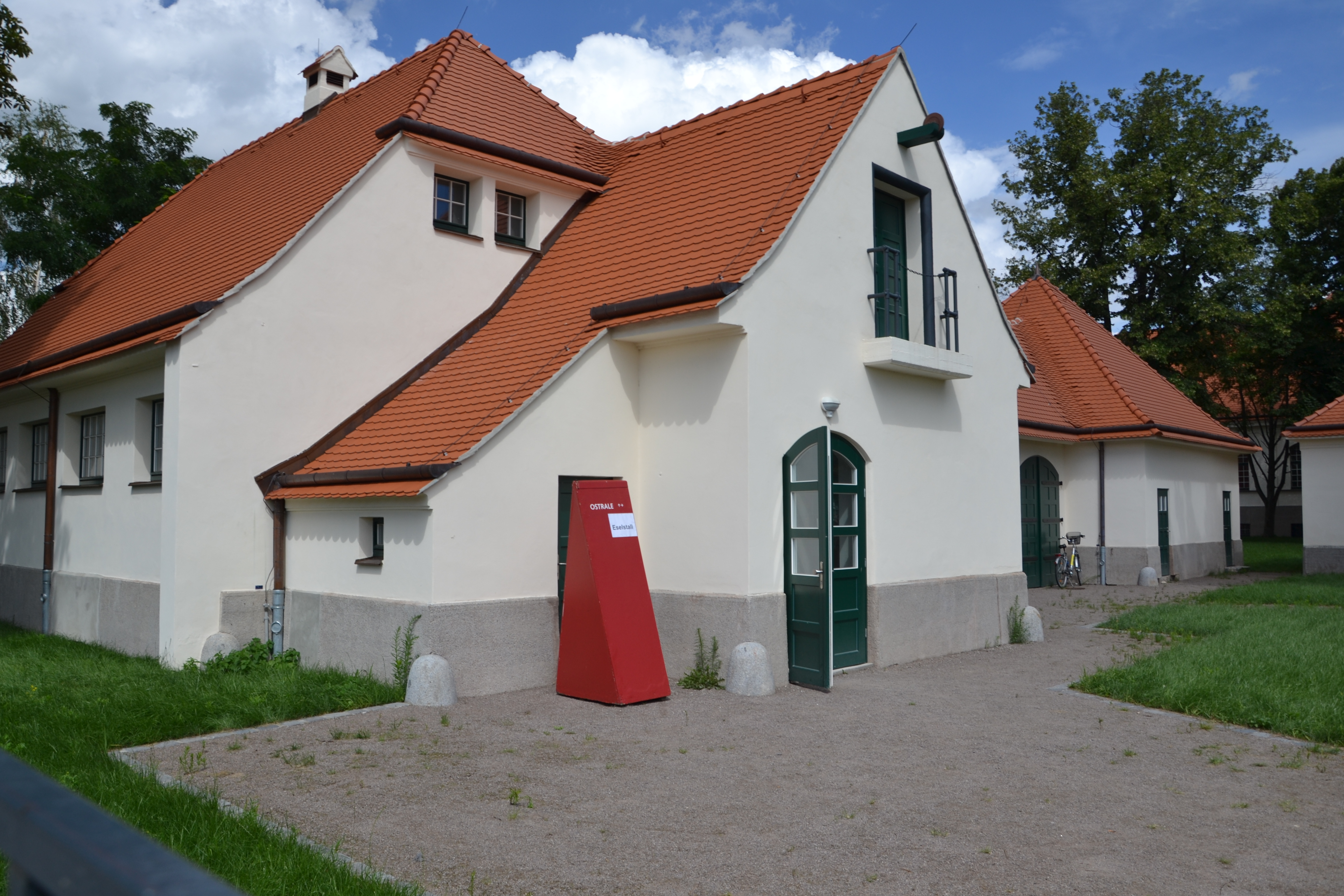 Der Eselstall, Dresden